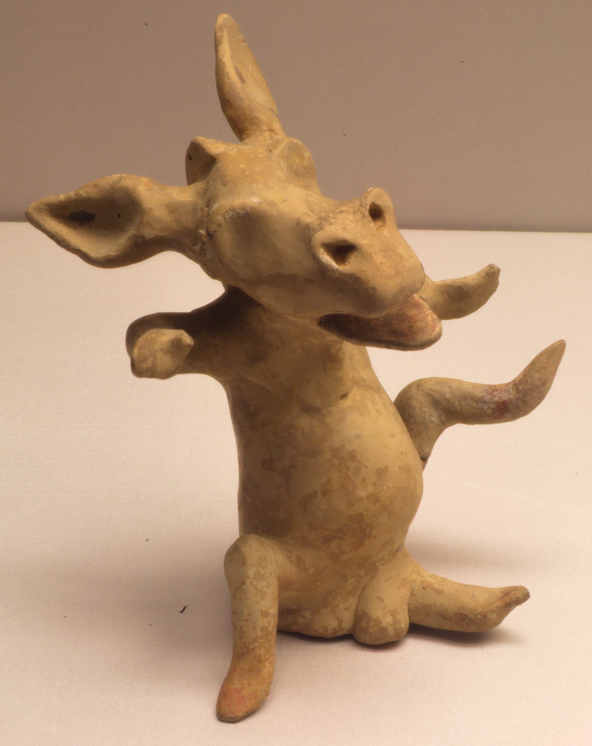 Komödienschauspieler in der ROlle eines Esels. (Evtl. Chor) Terrakote 4/5 Jhdt. v.Chr. Achaeia Peleponnes